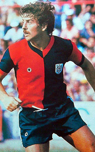 Allenatore di calcio e calciatore italiano